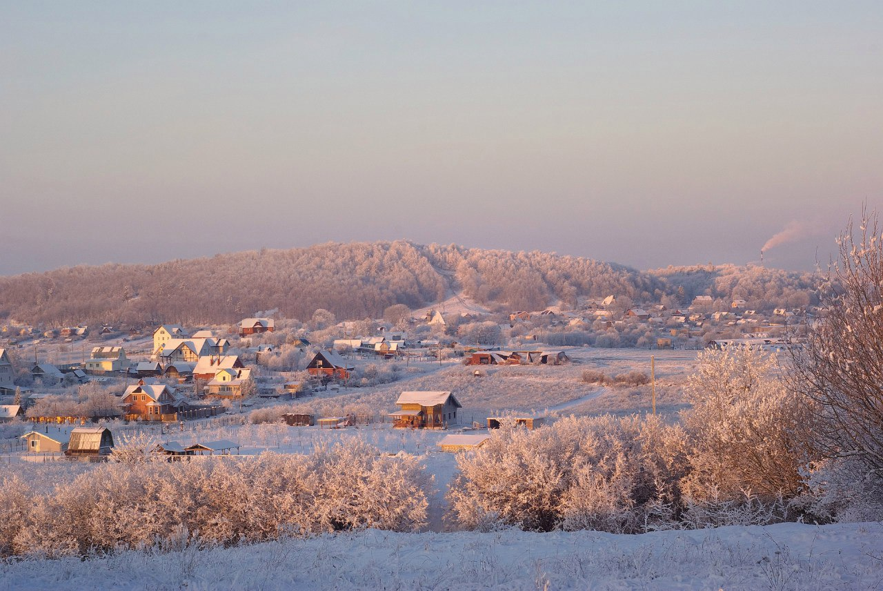 Ореховая гора, пос.Дудергоф.